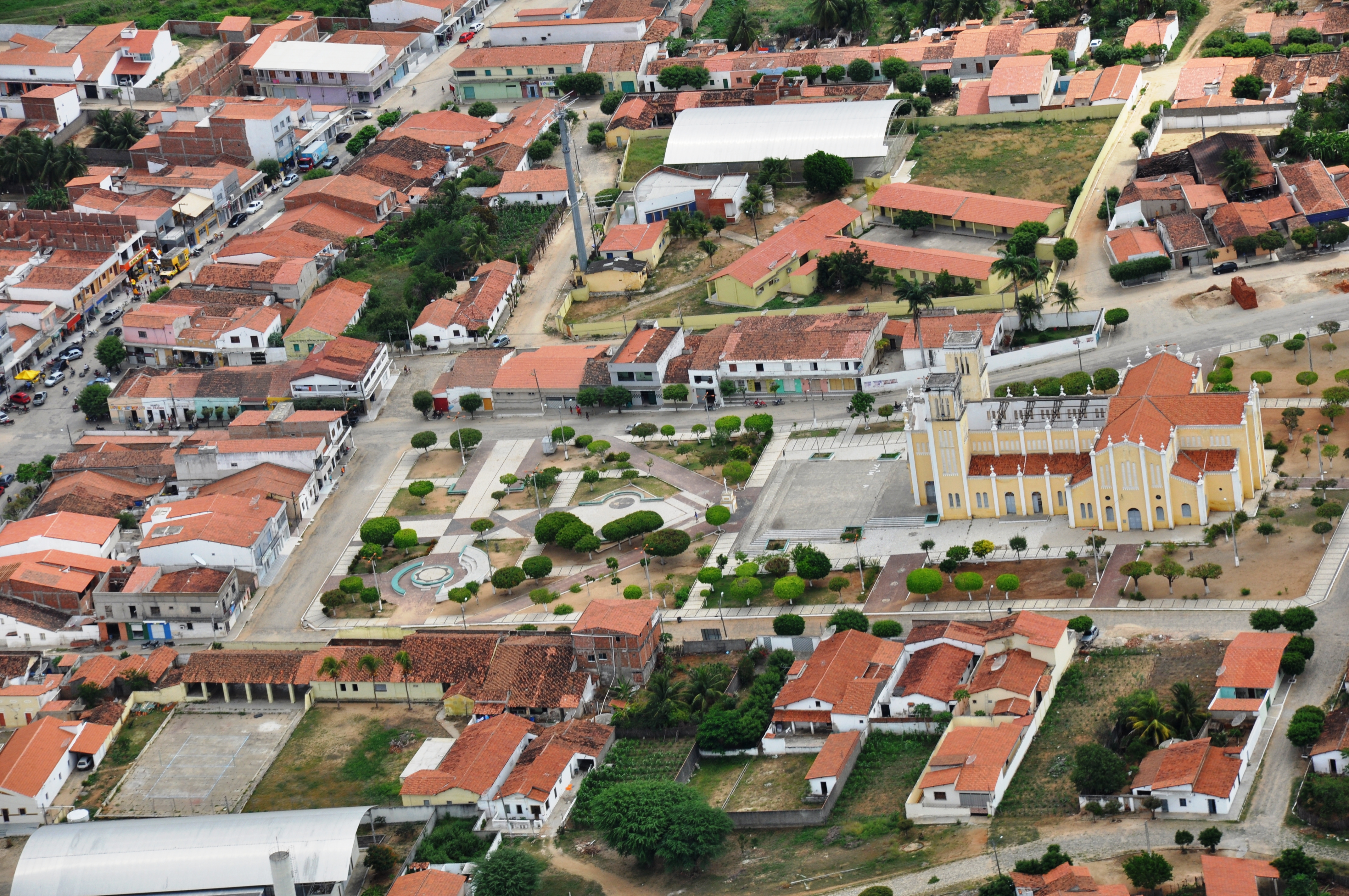 Igreja Matriz de Madalena